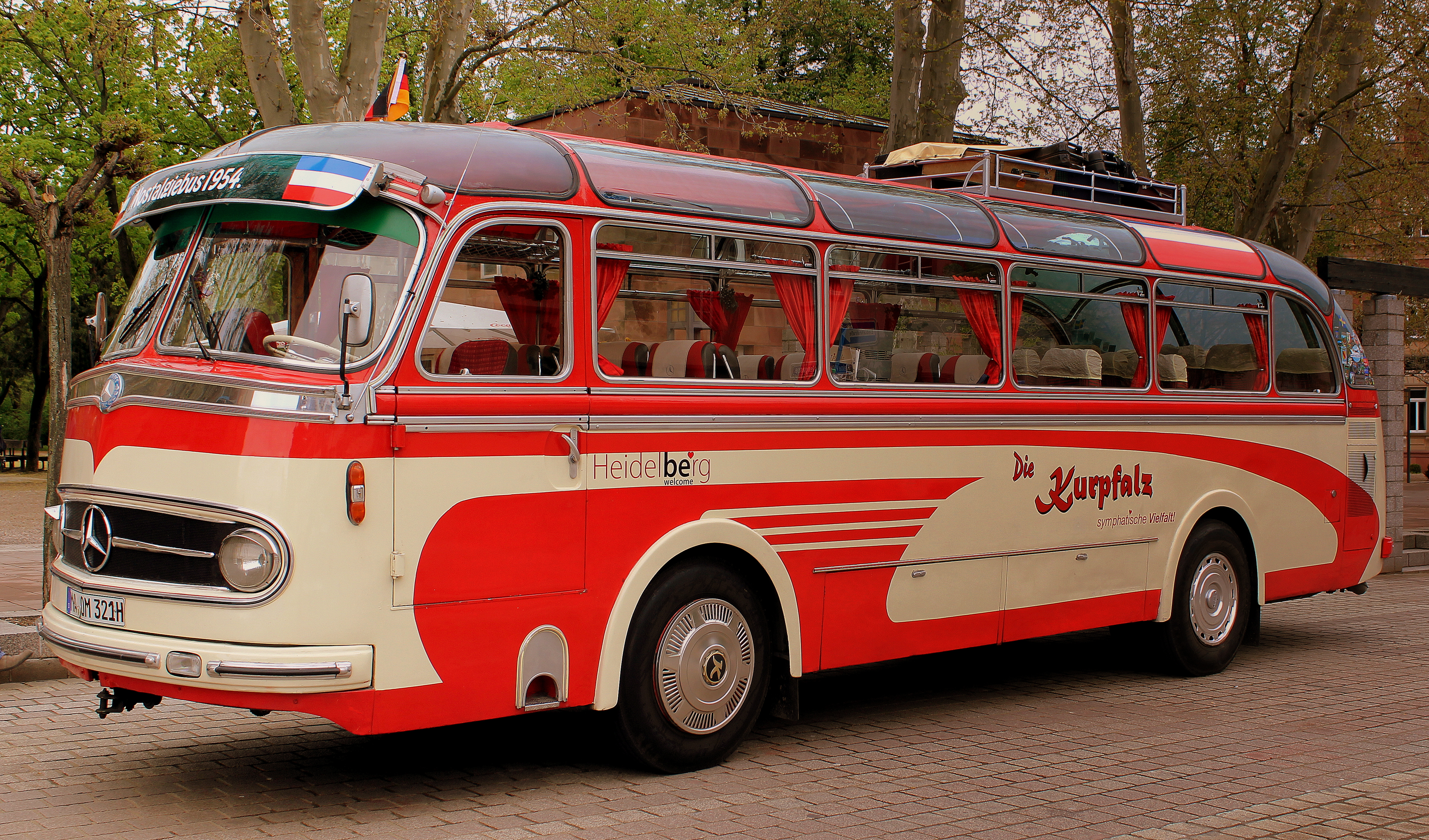 MERCEDES 1954 COACH DIE KUPFALZ SPEYER GERMANY APRIL 2013